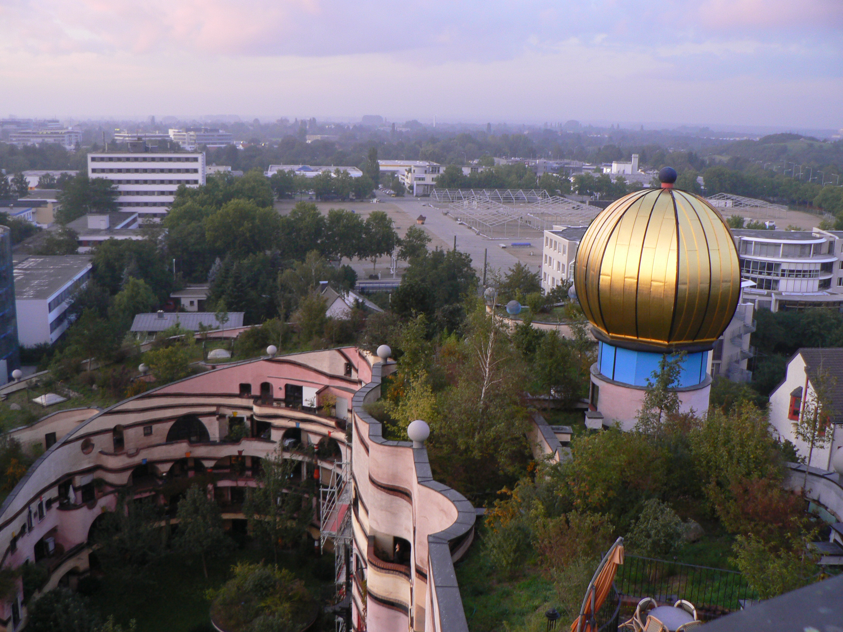 Dach der Waldspirale in Darmstadt